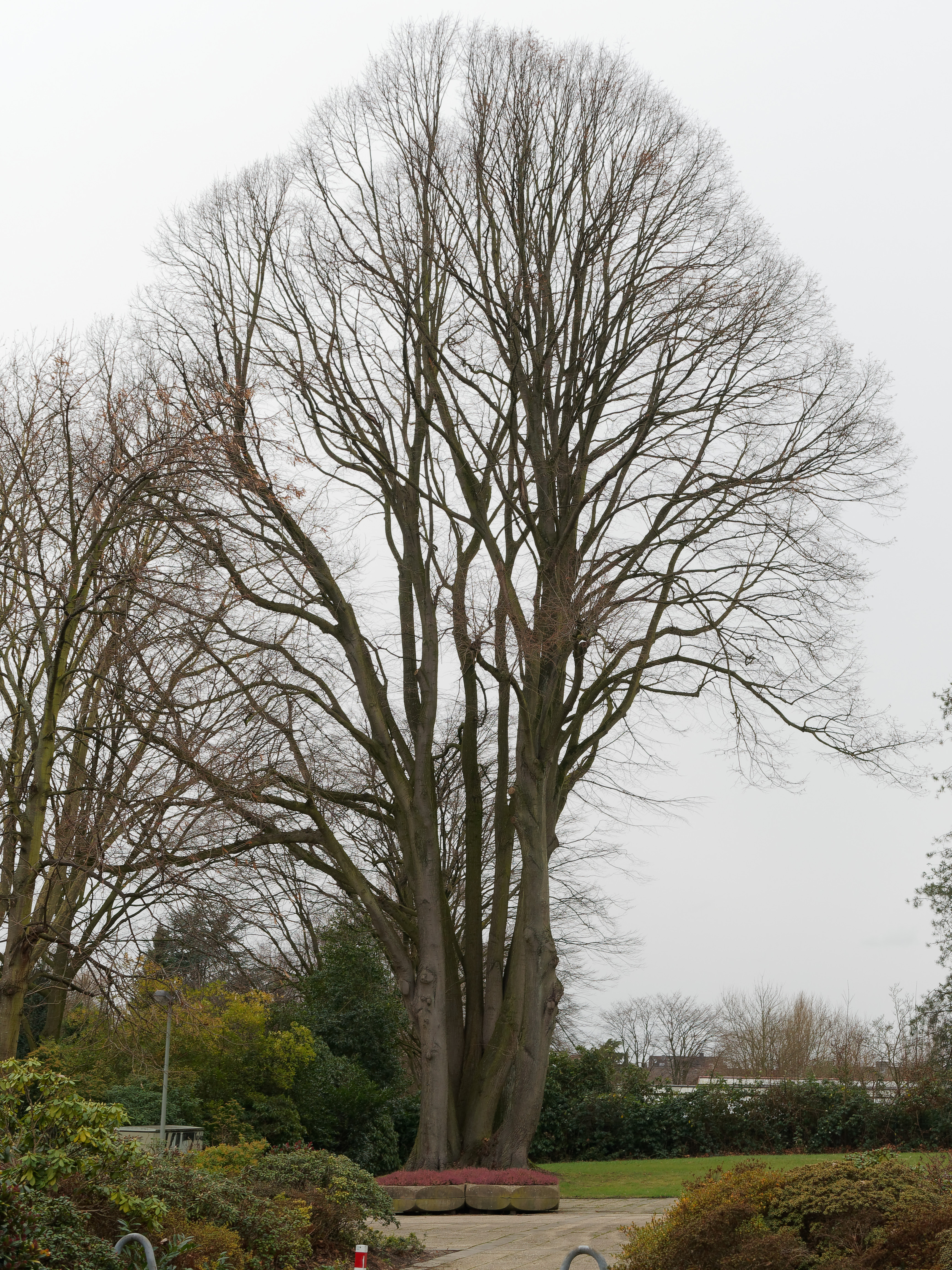 Winterlinde (Tilia cordata) mit sechs Stämmen im Eingangsbereich des Herner Südfriedhofs an der Wiescherstraße, Naturdenkmal